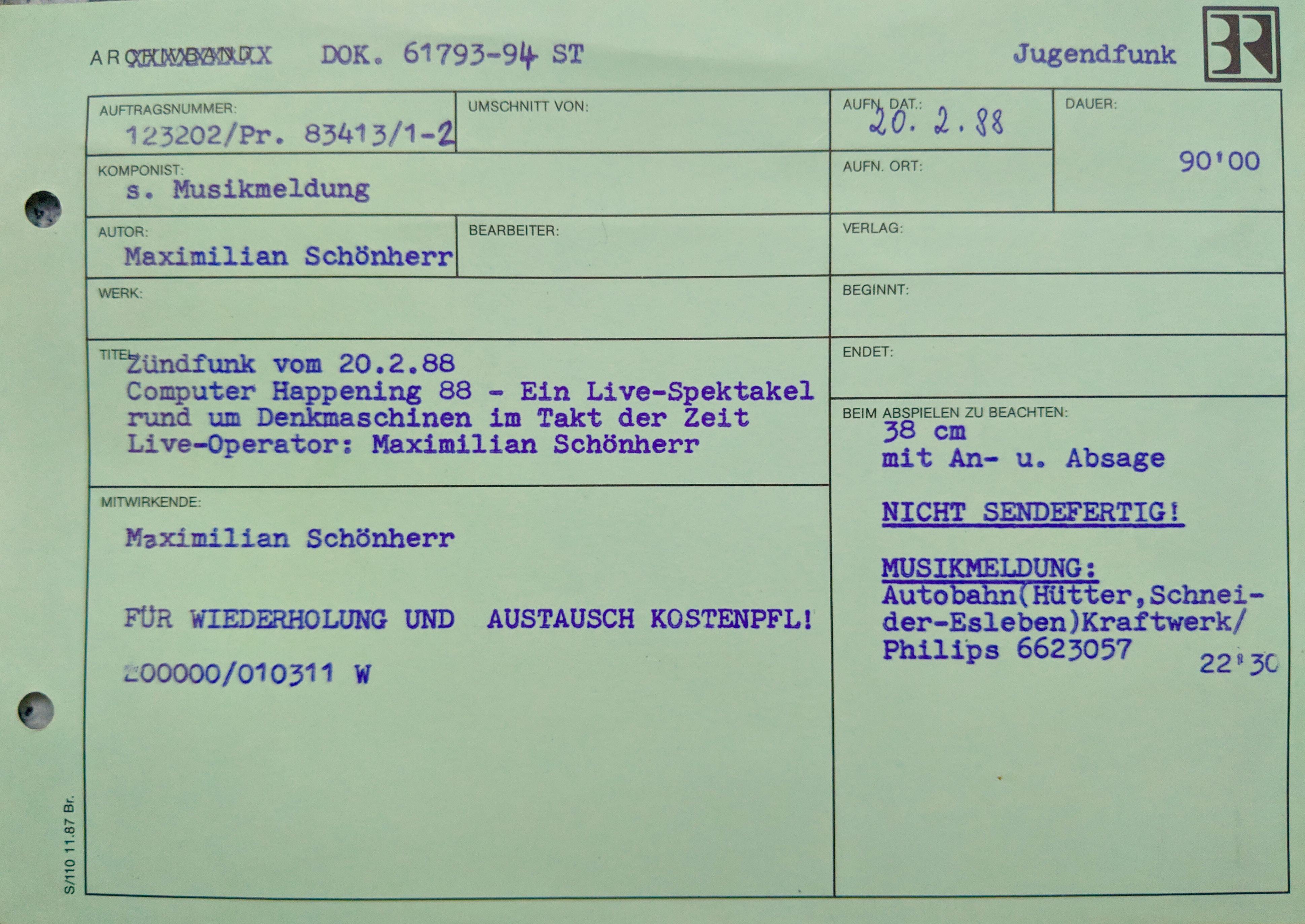 Bandpass einer BR-Zündfunksendung 1988. Bandpässe begleiteten bis in die frühen 2000er Jahre Sendebänder, hier für das Computer-Happening, einer Sondersendung des Computermagazin Bit, byte, gebissen.